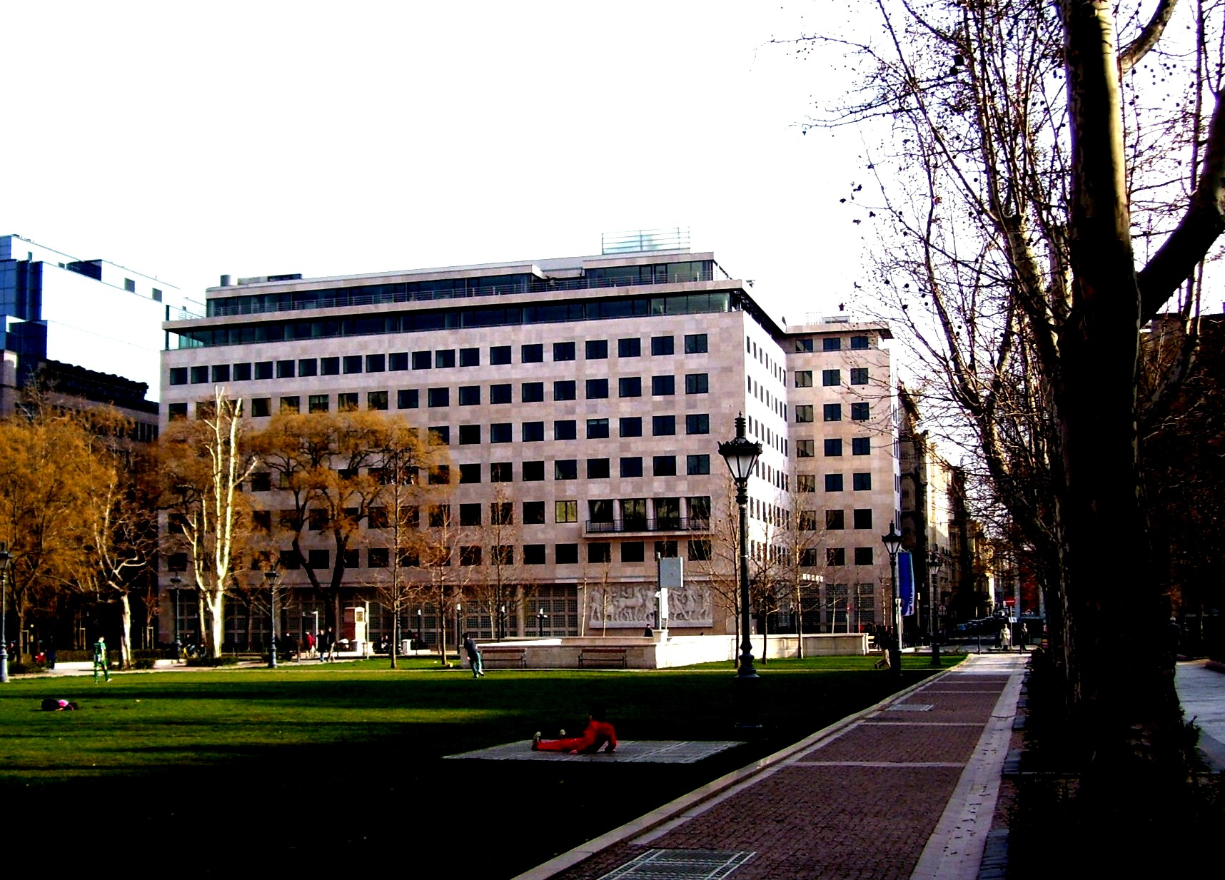 Pénzintézeti központ 1938–40. Tervezője: Lauber László (Pécs, 1902. május 21. – Budapest, 1953. augusztus 13.) építész, a magyar avantgárd építészet kiemelkedő alkotója